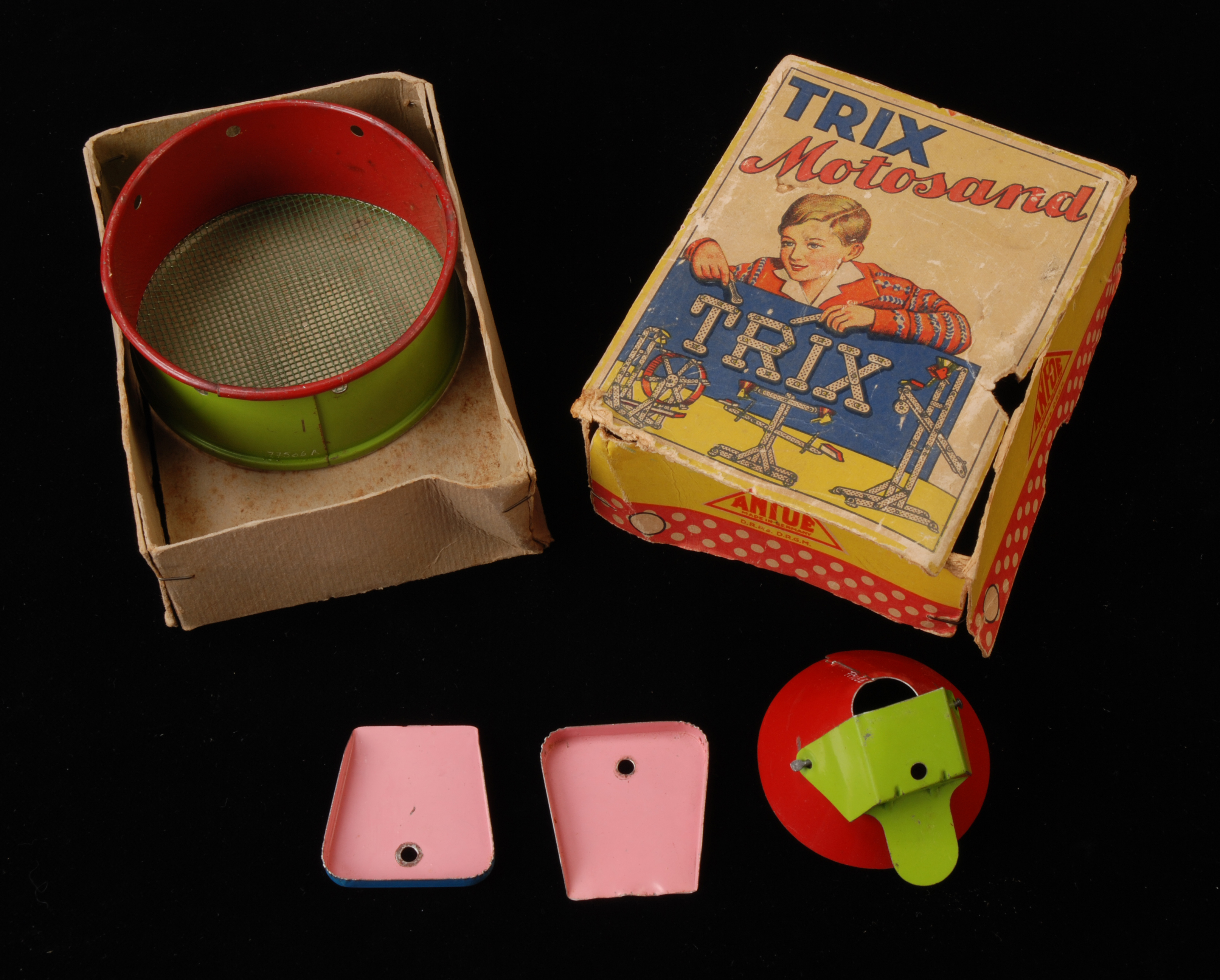 Objectgegevens Titel: “Trix Motosand” bouwdoos, met groen-rode zeef, rood, groen en gele zandtrechter, twee roze en blauwe scheppen Beschrijving: "Trix Motosand" bouwdoos in oorspronkelijke verpakking (deksel E, doos F), met zeef (A) in groen en rood, zandtrechter (B) in rood, groen en geel, twee scheppen in roze en blauw (C, D). Trefwoorden: metaalbouwdoos, bouwdoos, constructiespeelgoed, speelgoed, ontspanningsmiddel Opschrift / merk: Voorzijde "TRIX / Motosand / TRIX", rondom in driehoeken "ANFOE / MADE IN GERMANY", "D.R.P.a. D.R.G.M.". In het boekje bij 77507 "Motozand" genoemd: "Aanvullingsdoos voor het bouwen van automatische door zand bewogen modellen." Vervaardiger: Trix Vereinigte Spielwaren-Fabriken Plaats vervaardiging: Duitsland, Neurenberg Datering: 1935 - 1939 Materiaal: karton, metaal, ijzer, tin, verf Afmetingen: (cm) hg 4,0 / br 9,5 / dp 13,0 Associatie: Trix, Meccano, spelen, jongen Vorm & decoratie: figuur, jongen Inventarisnr: Museum Rotterdam 77506-A-F